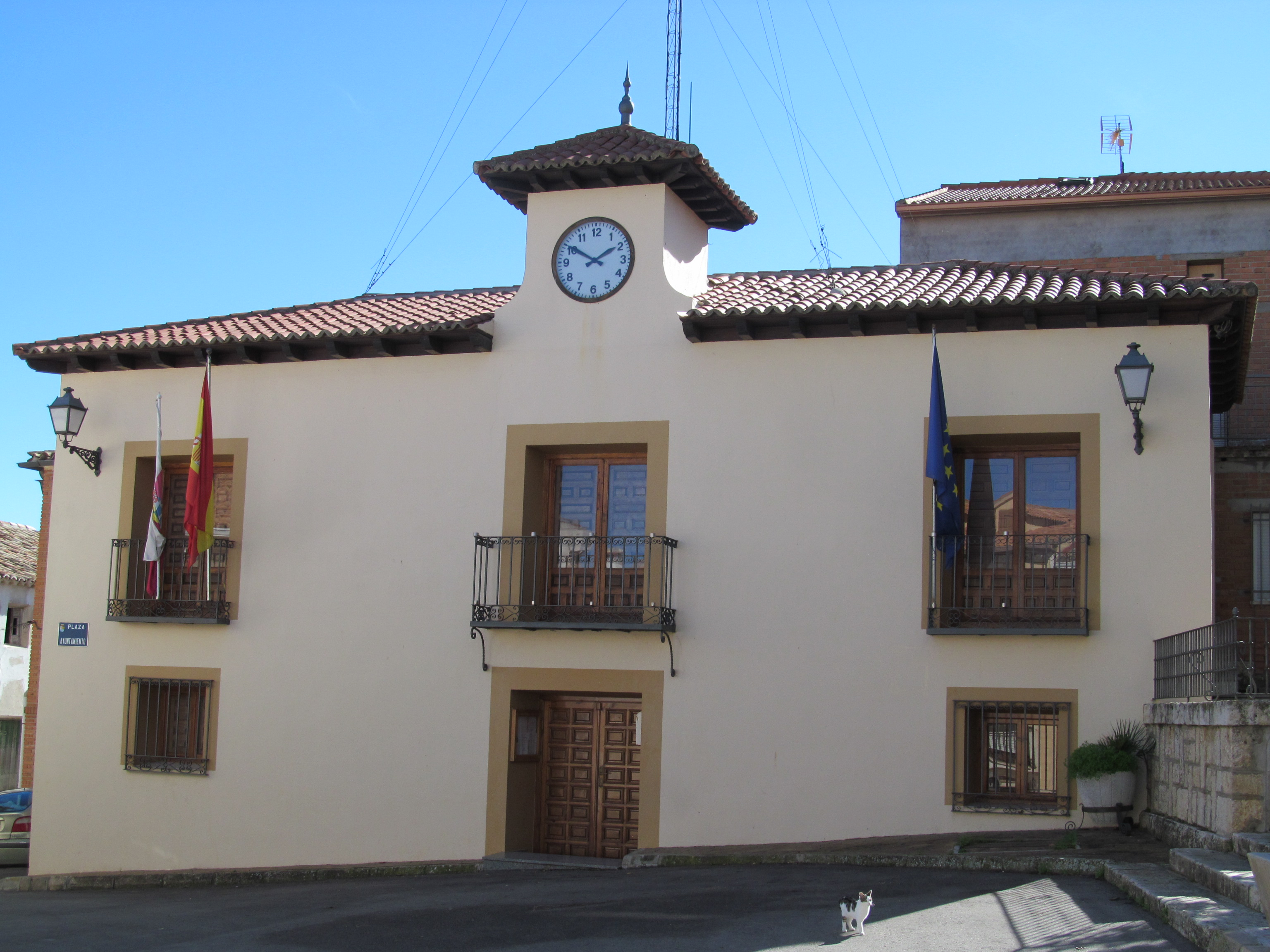 Sayatón-La casa del Ayuntamiento.